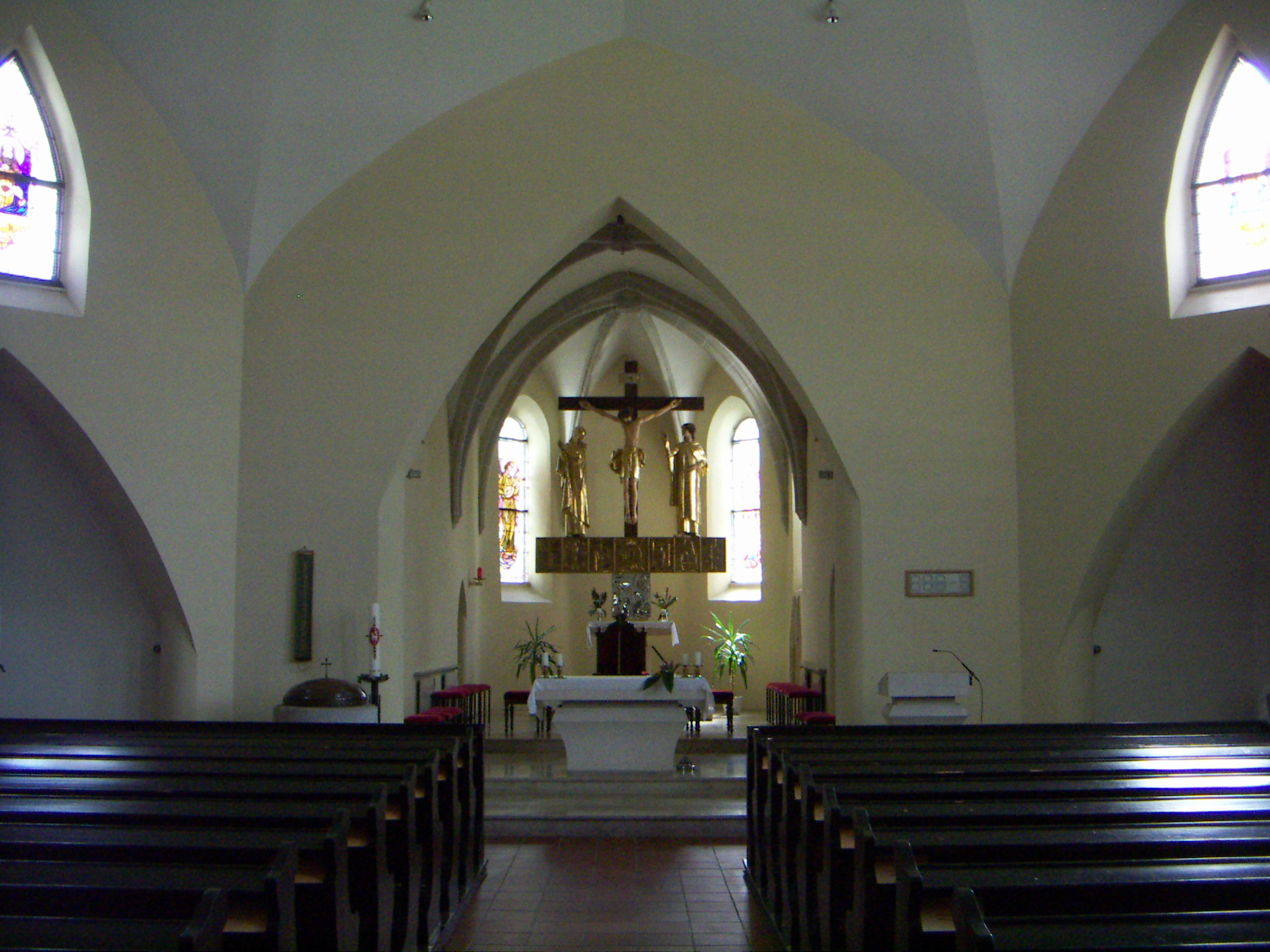 Kath. Pfarrkirche hl. Jakobus der ÄltereLanghaus richtung gotischer Chor